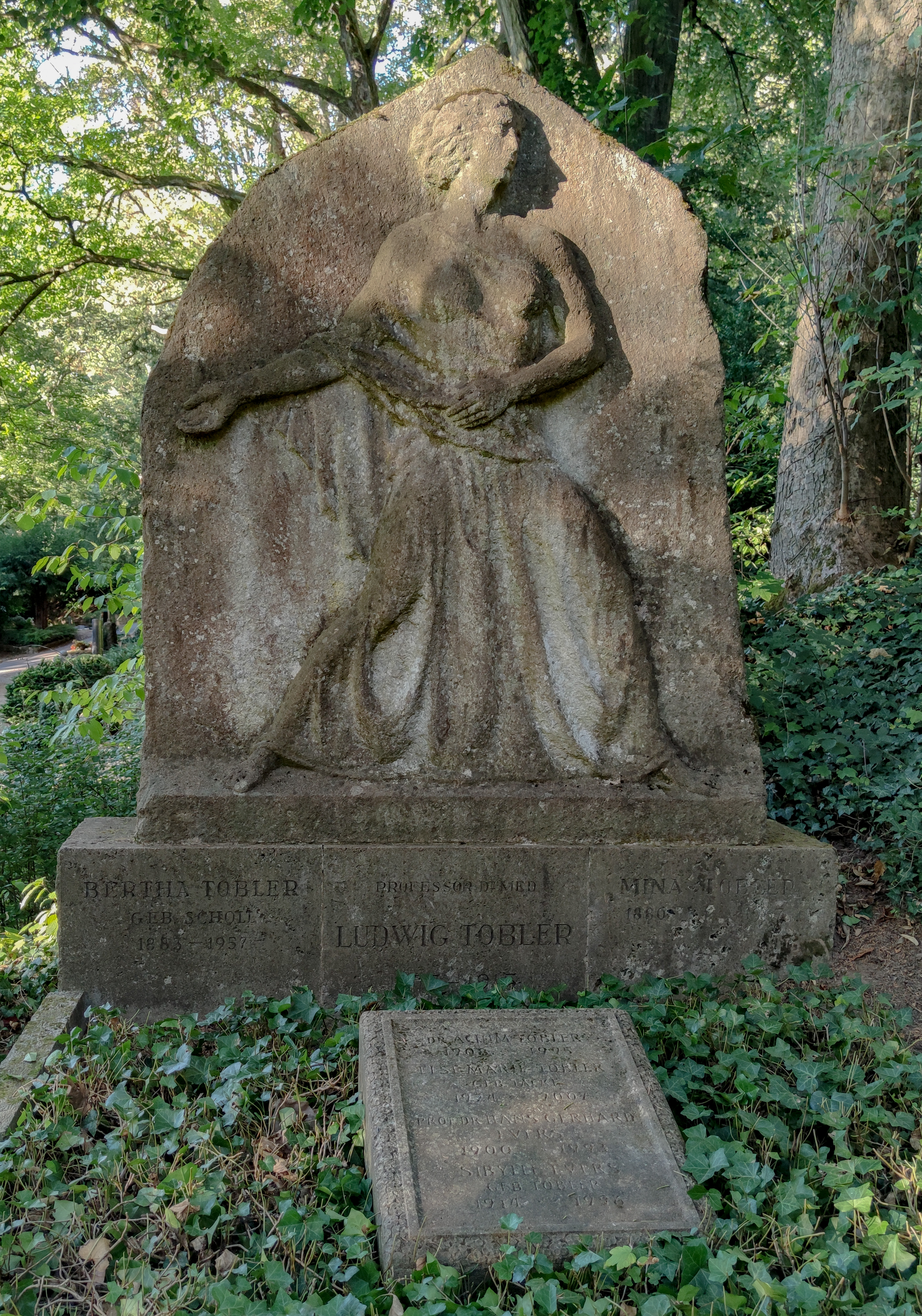 Relief des schweizer Bildhauers Hermann Haller (1880 - 1950) auf dem Grab von Ludwig, Berta und Mina Tobler auf dem Bergfriedhof in Heidelberg.